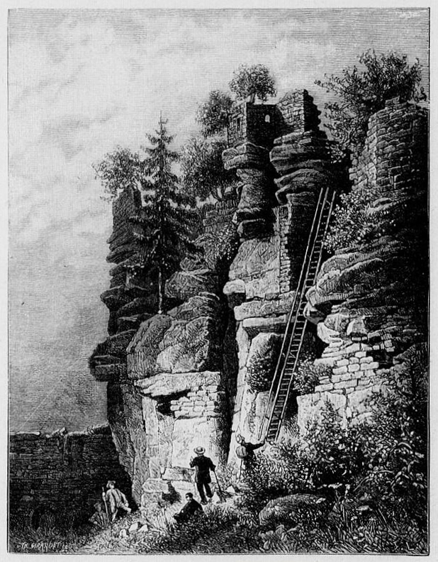 Château d'Ochsenstein, gravure